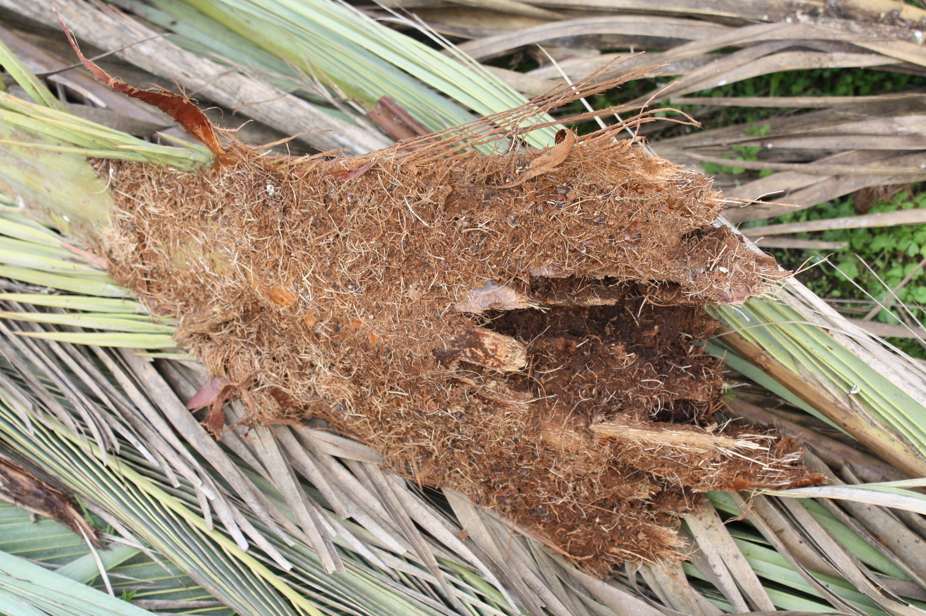 Base dunha folla de palmeira parasitada polo picudo vermello, en Monteporreiro (Pontevedra)